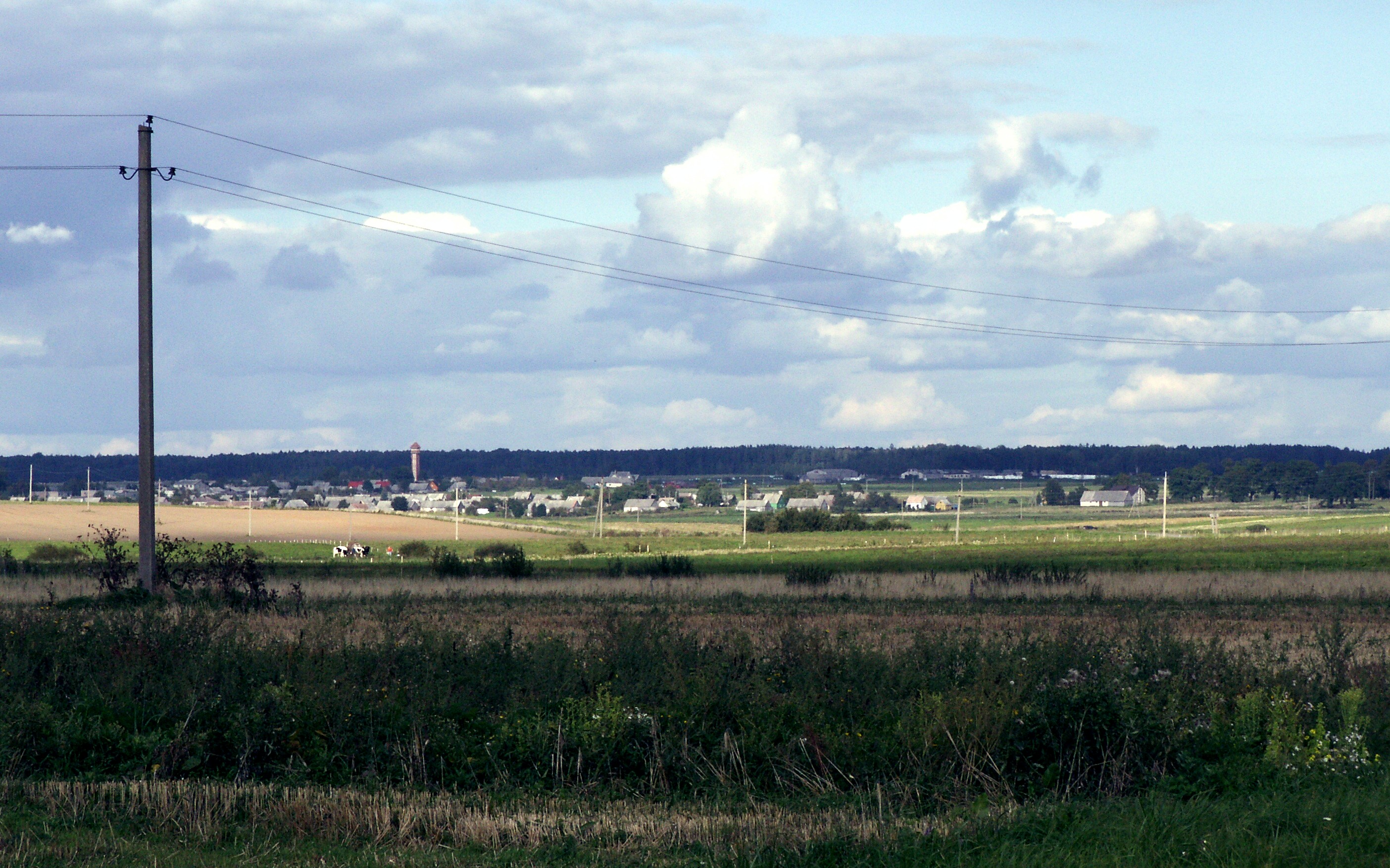 Upyna, Telšių rajonas, Lietuva